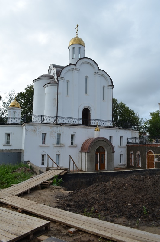 Вид со строны реки Клязьмы